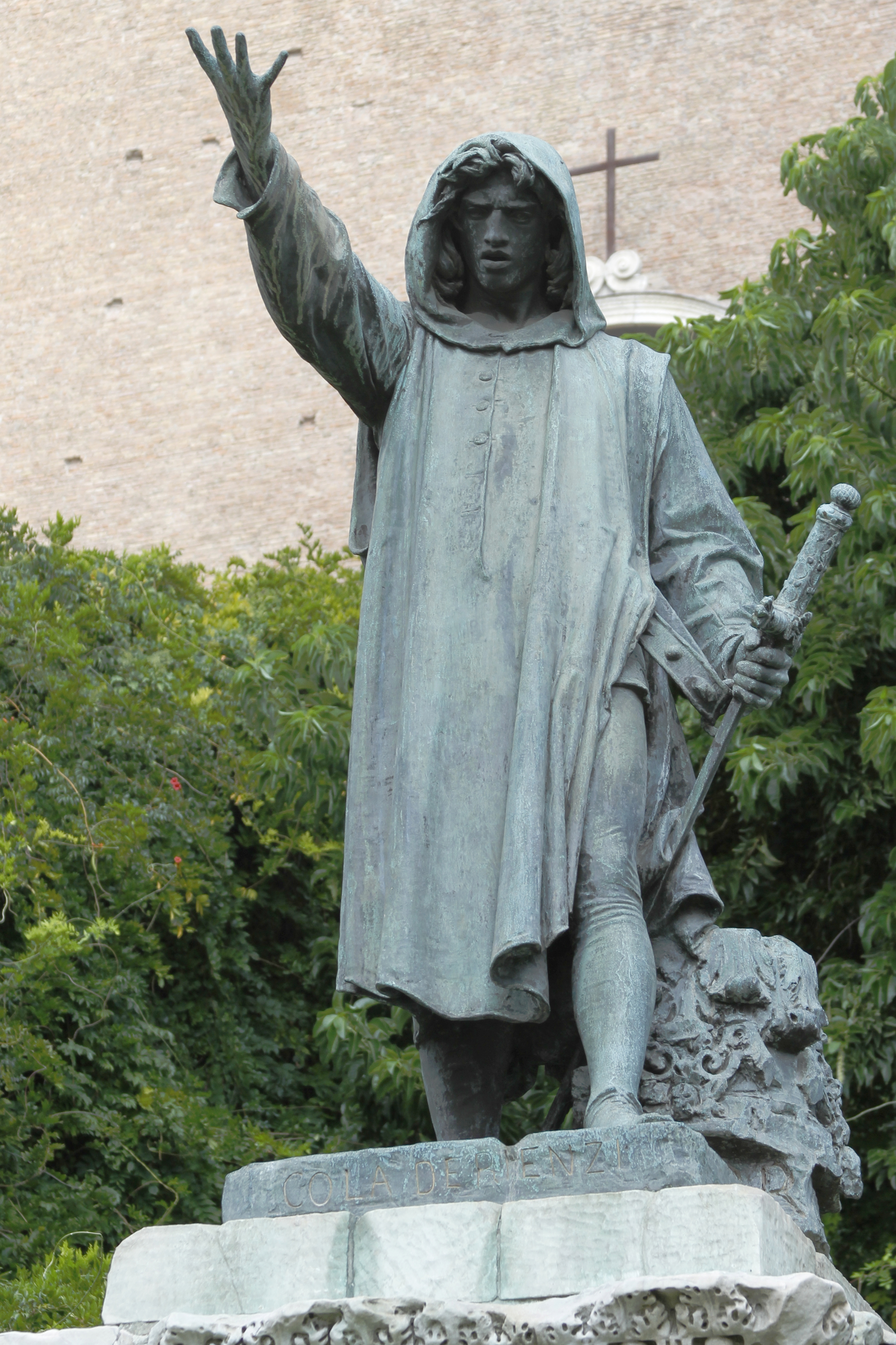 Piazza del Campidoglio - Rome